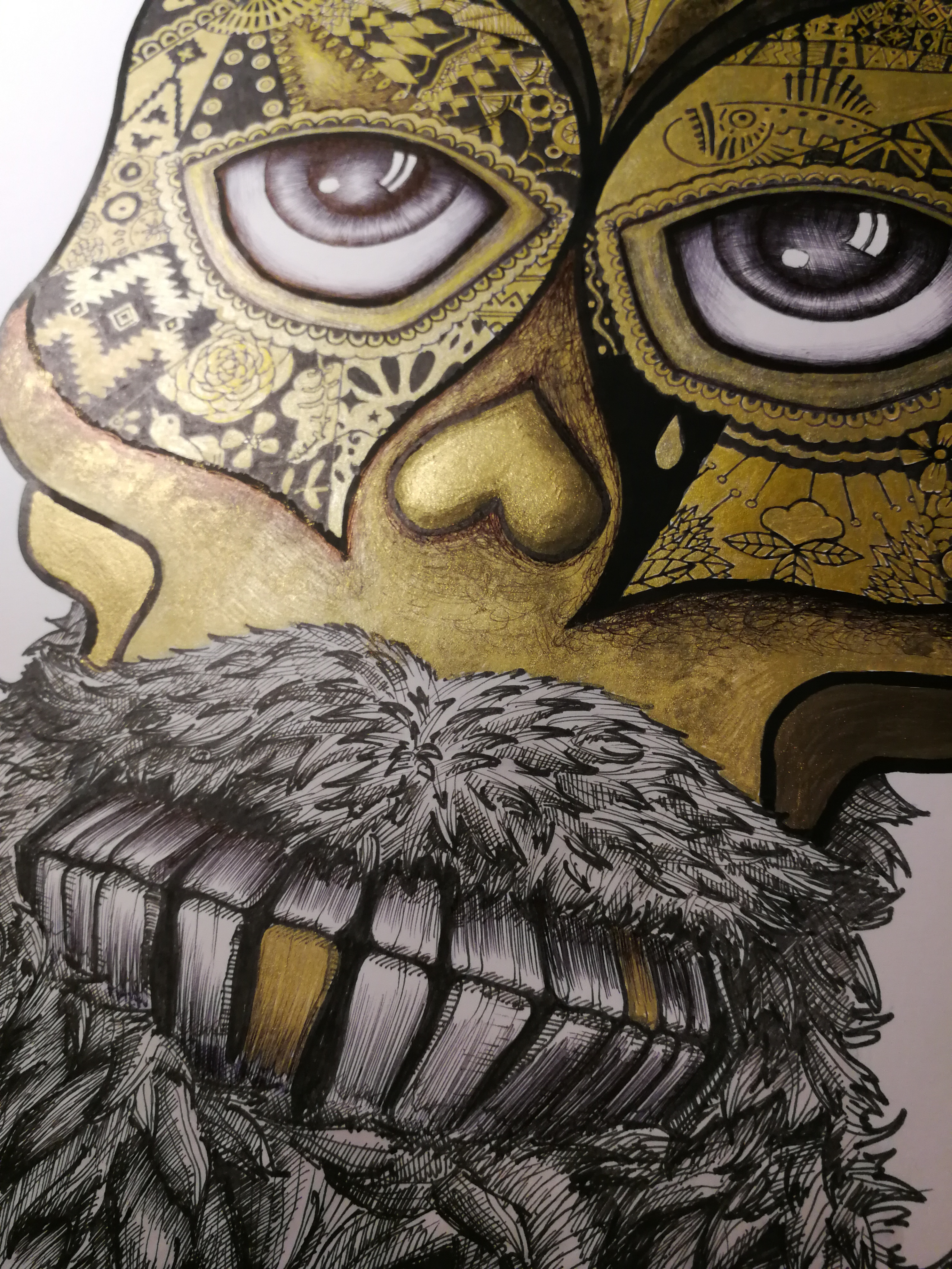 inspirée des Calavera mexicain, cette illustration réalisé en 2018 est réalisée à base de stylos à encre de chine et différentes peinture dorée.